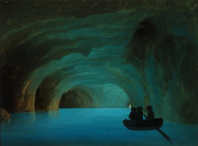 "Niebieska grota Capri" - obraz Maksymiliana Antoniego Piotrowskiego (1843 r.)